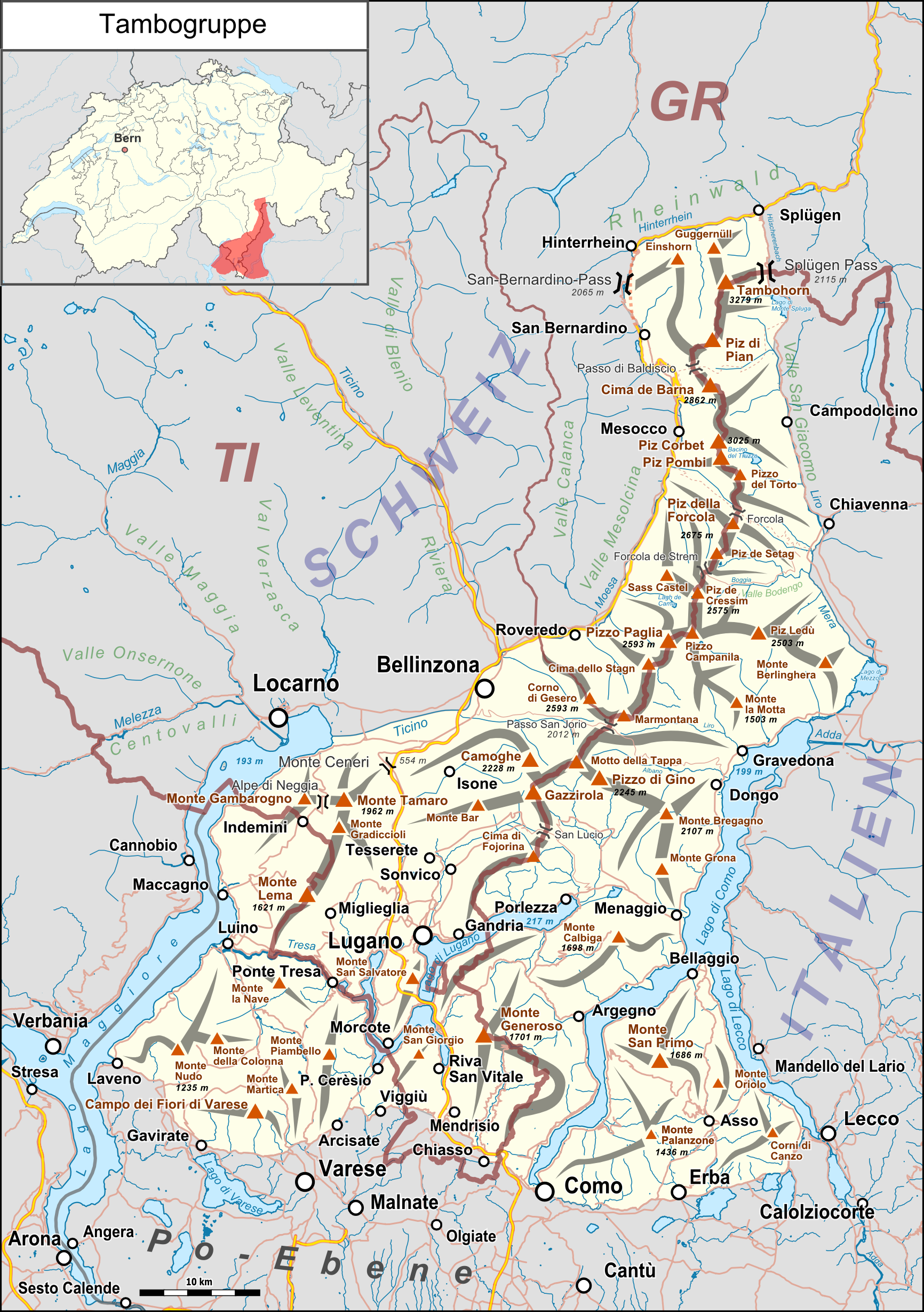 Lagekarte der Tambogruppe